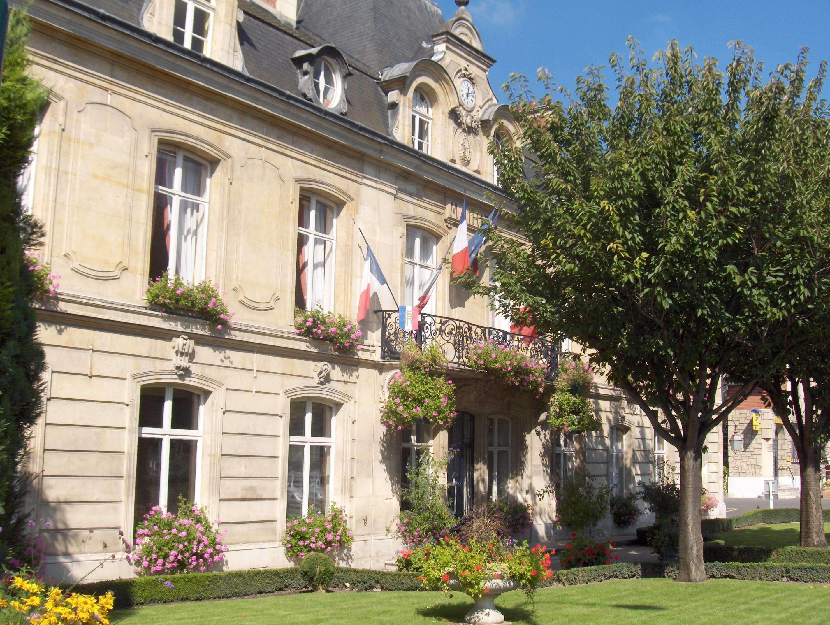 Mairie de Parmain, 1828